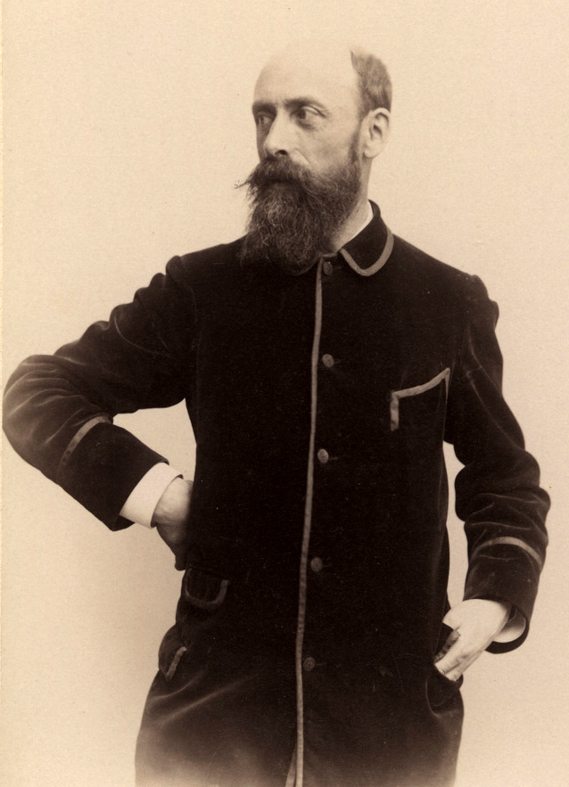 Foto Porträt Nikolaus Geiger, stehend, ohne Datum (Provenienz PrAdK Pers BK 154) Klassifikation 1.1.2 Mitgliederporträts gemeinfrei, Bestand: Historisches Archiv Preußische Akademie der Künste